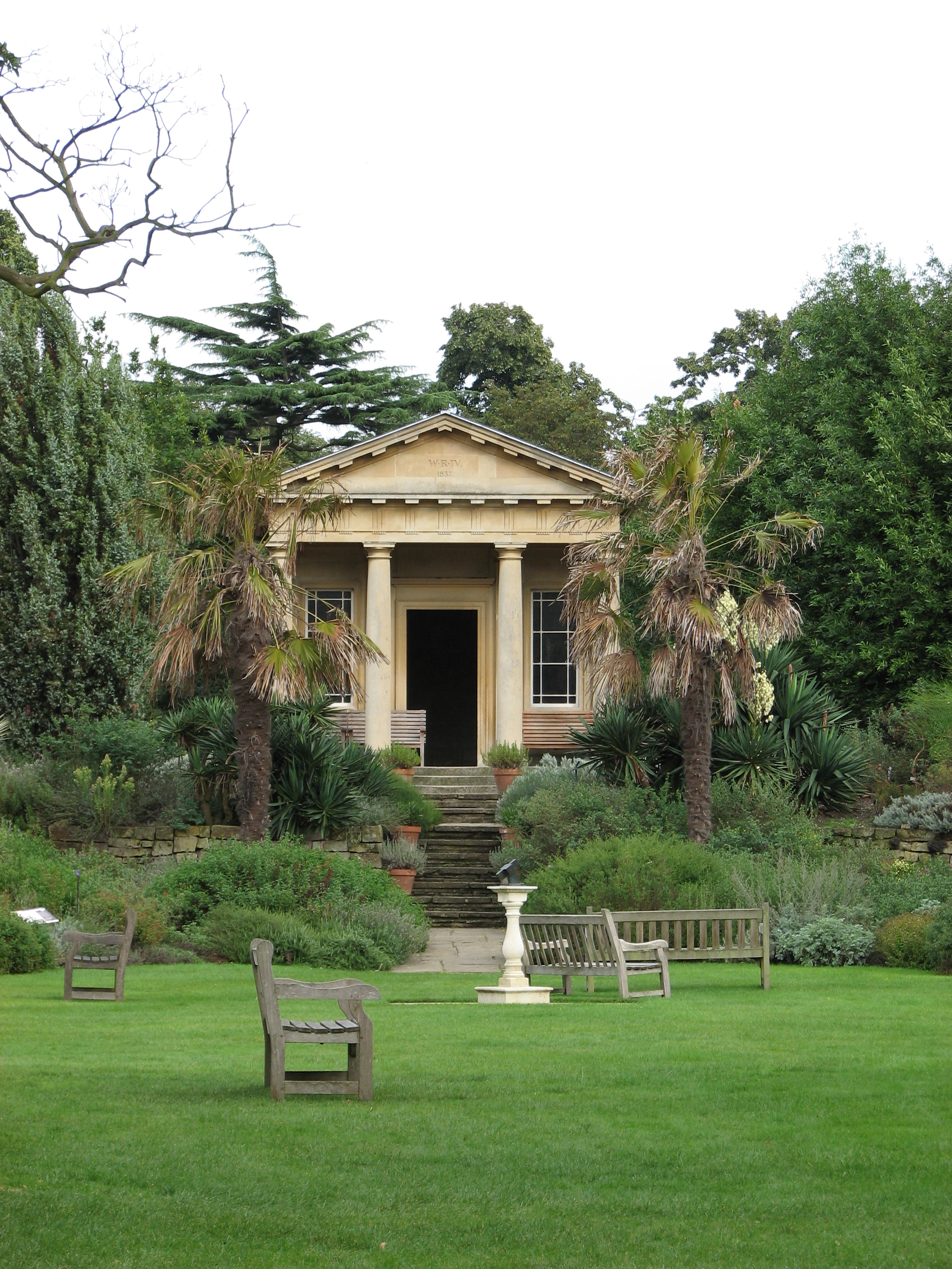 Kew Gardens - London - September 2008